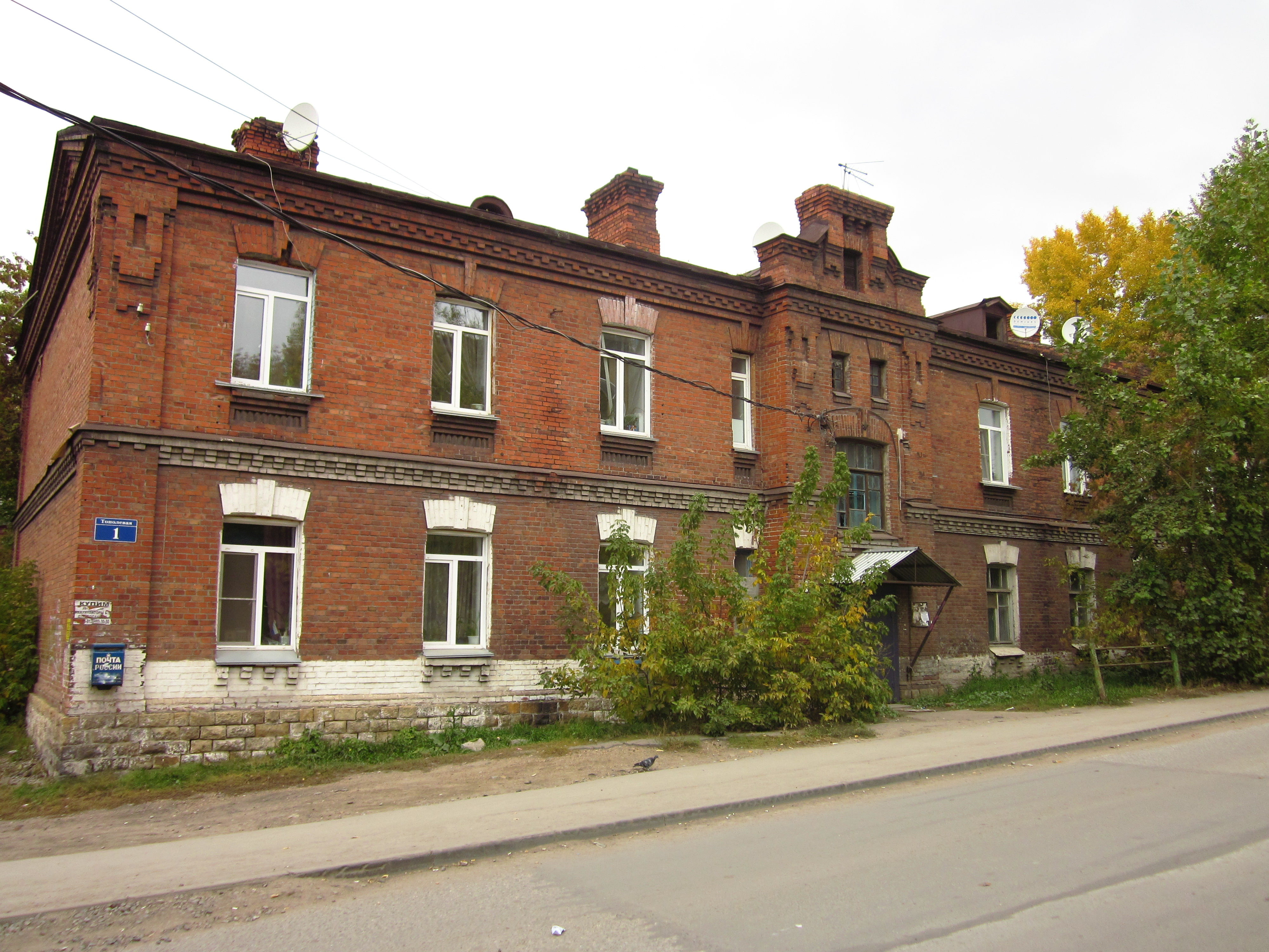 Дом для 8 семей старших офицеров. ул. Тополёвая,1. Построен в 1910 - 1913.